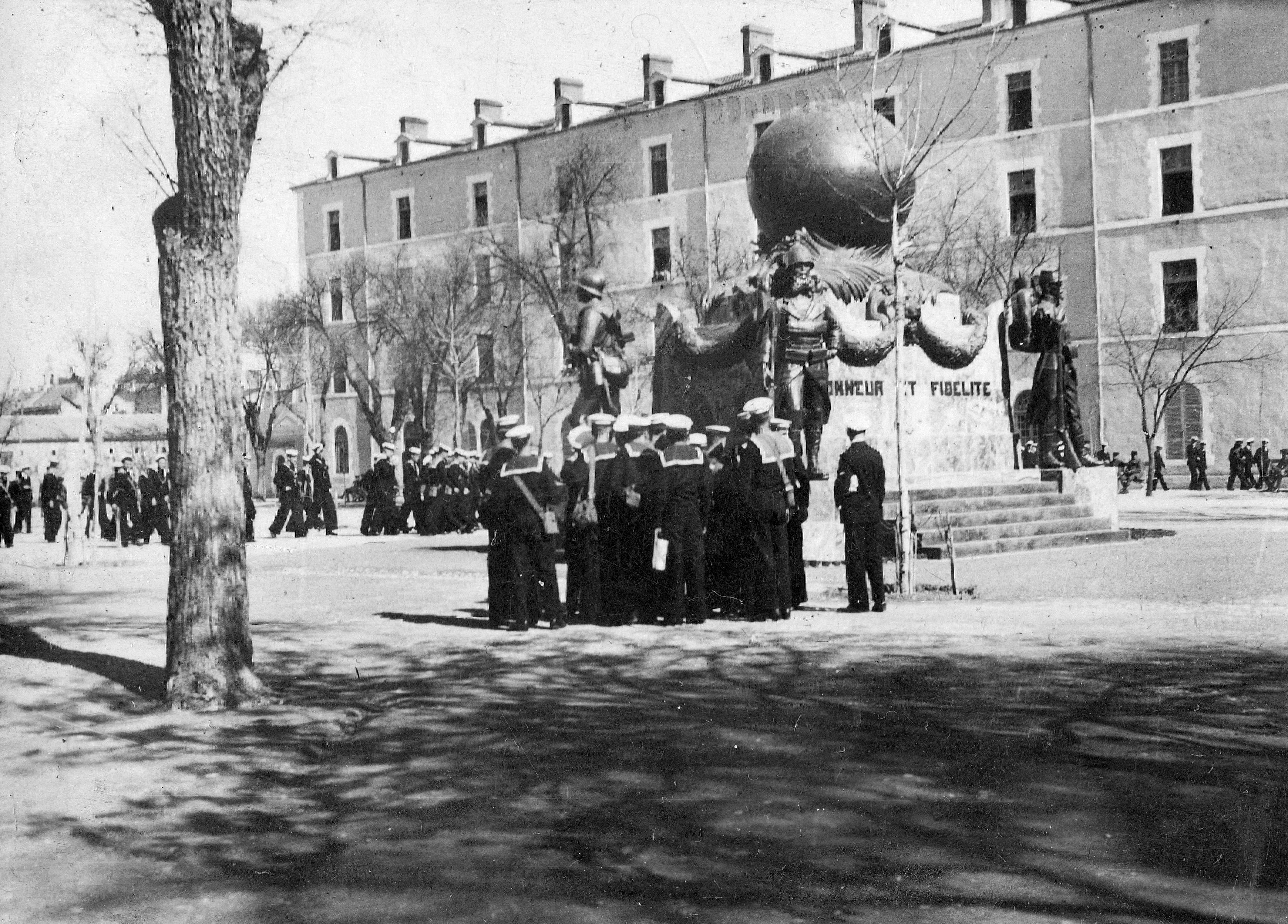 Az elesett légiósok emlékműve (Monument aux Morts de la Légion Etrangère). Location: Algiers Tags: sculpture, label, sailor, monument Title: Az elesett légiósok emlékműve (Monument aux Morts de la Légion Etrangère).